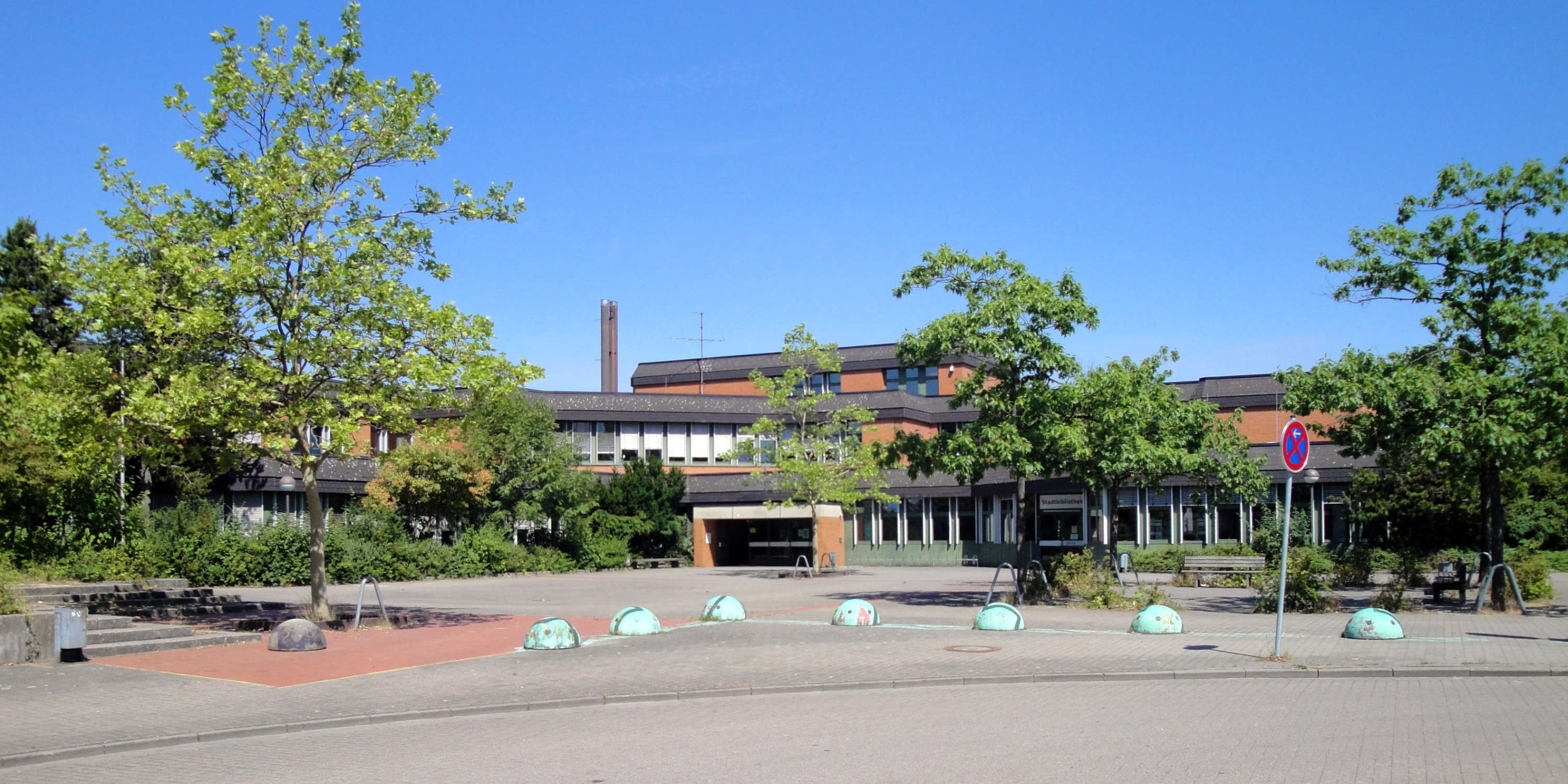 Schule am Ried / HRS Haupt- und Realschule Hämelerwald, Lehrte